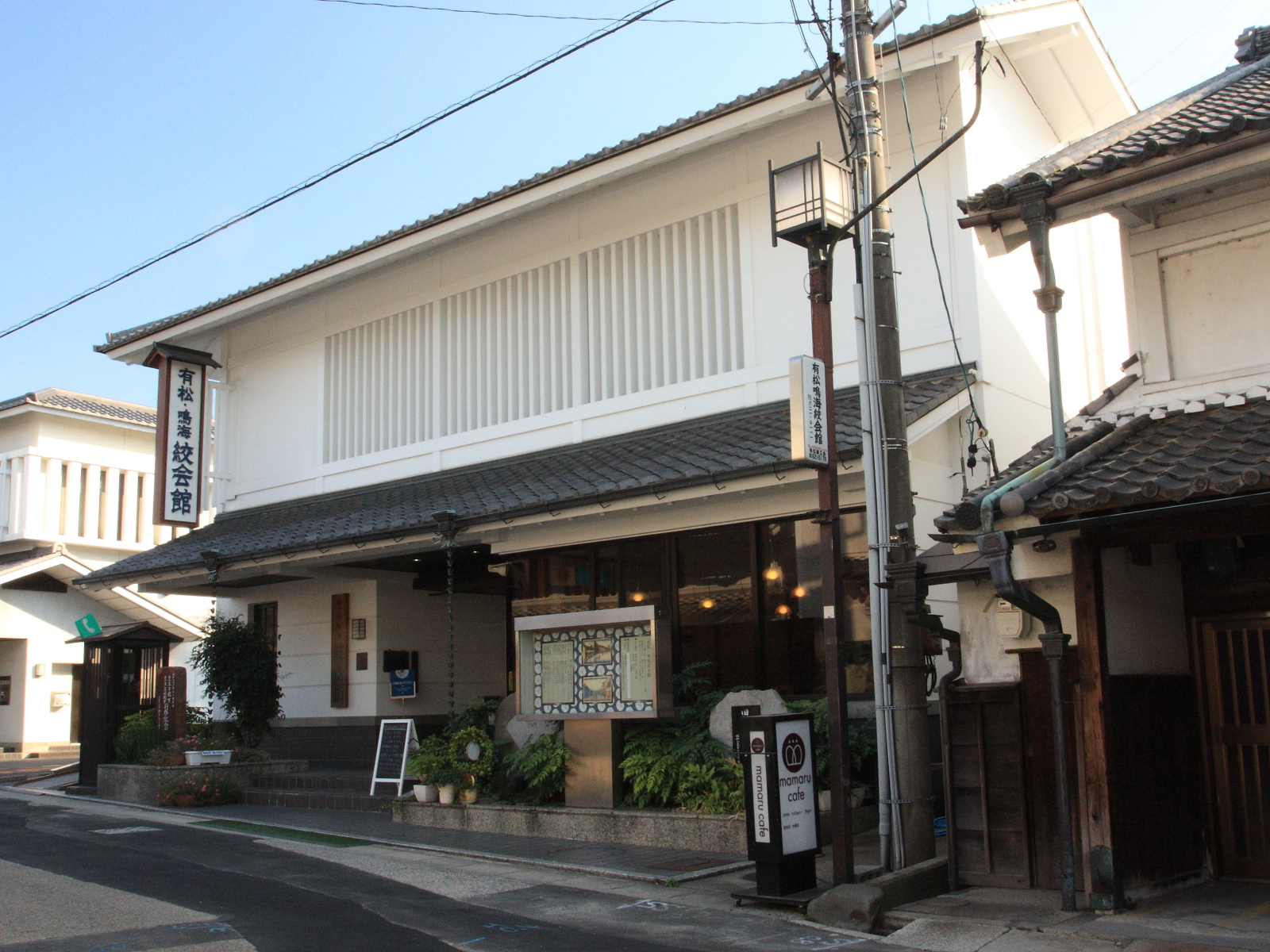 有松・鳴海絞会館（名古屋市緑区、2009年）